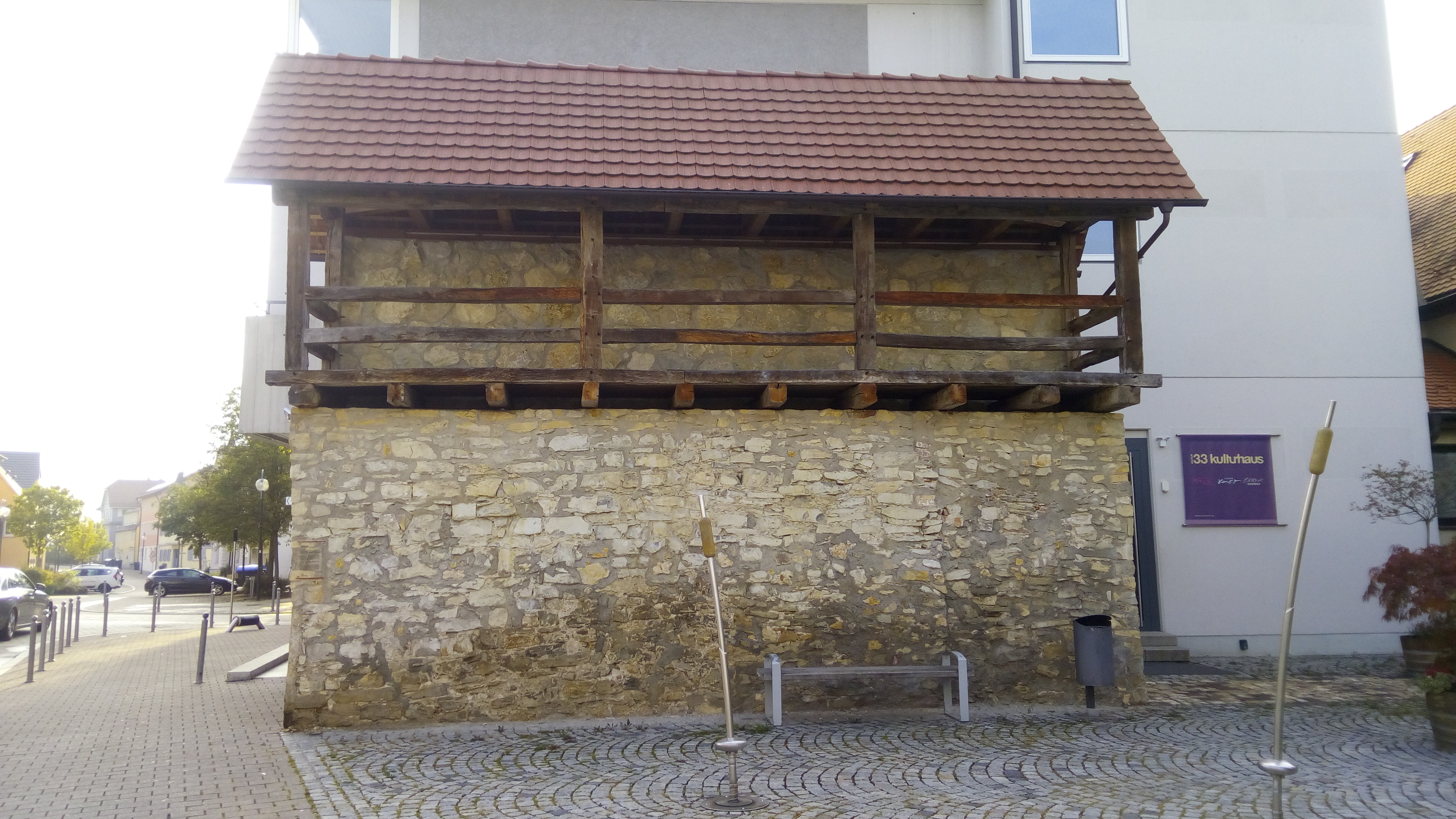 Ein Teil der Stadtmauer an der Hauptstrasse in Münsingen